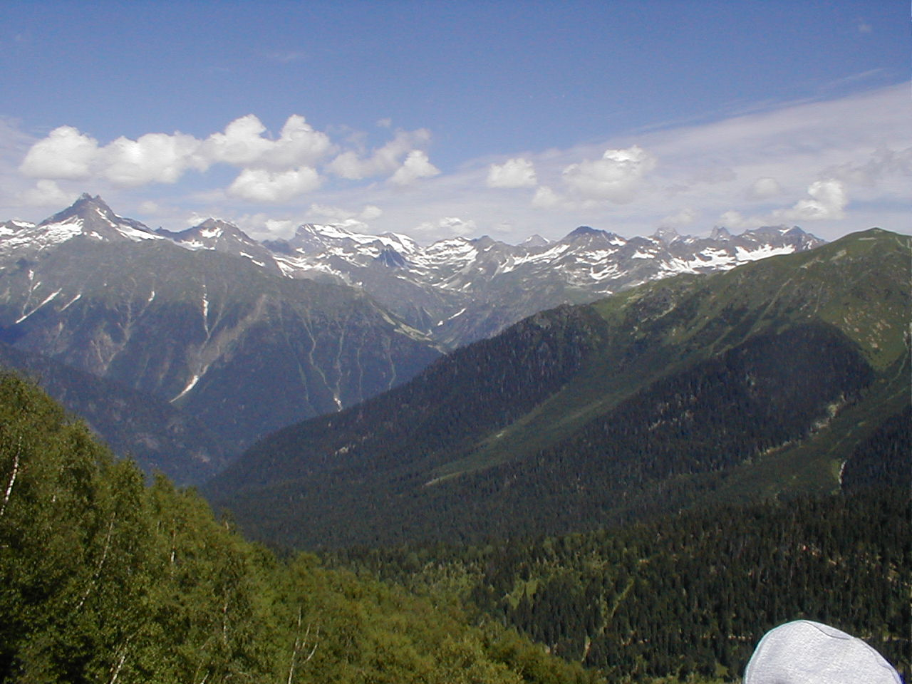 Mountains in Svaneti